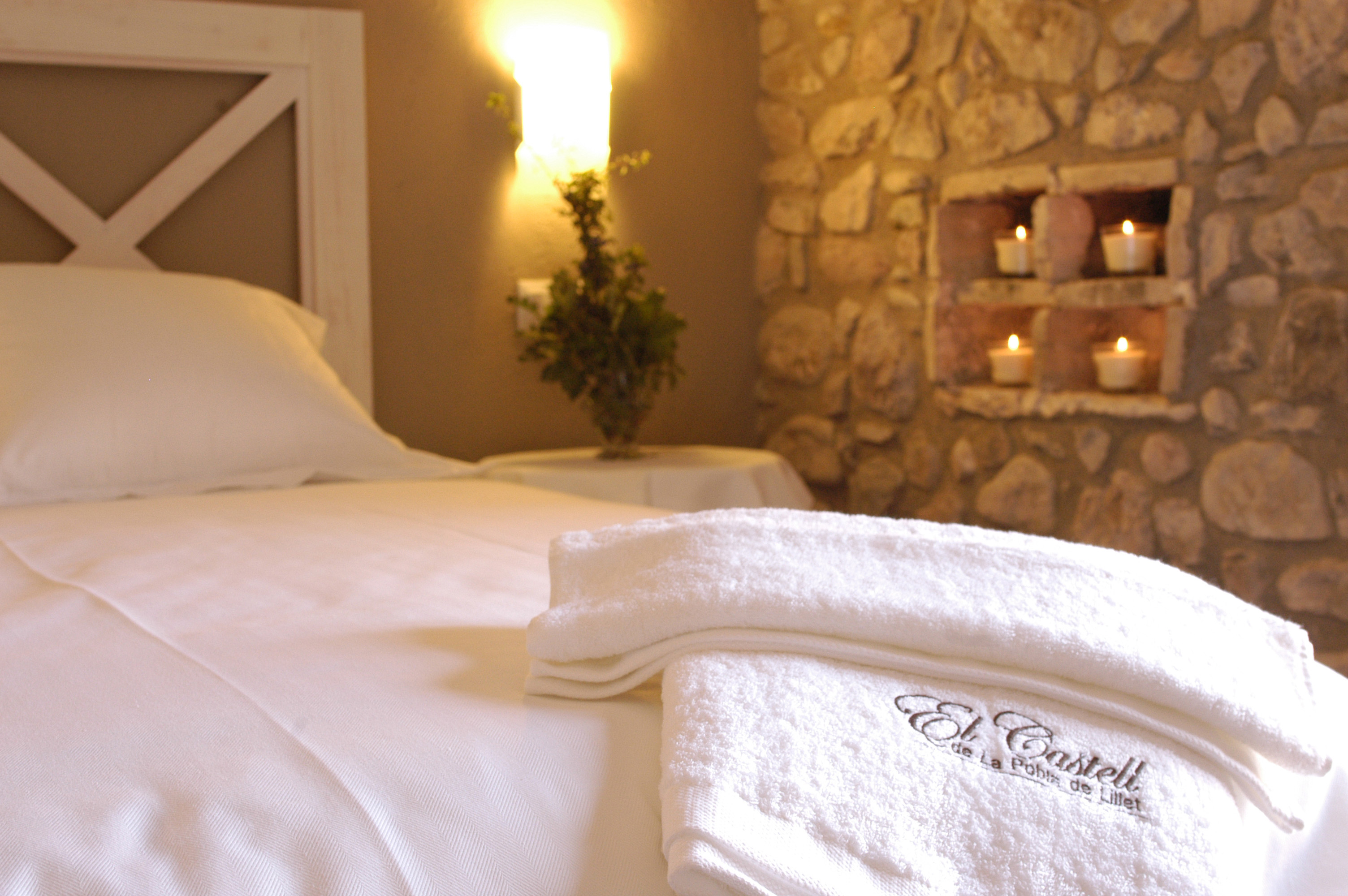 En una de las habitaciones se ha respetado el palomar que había antes de la rehabilitación